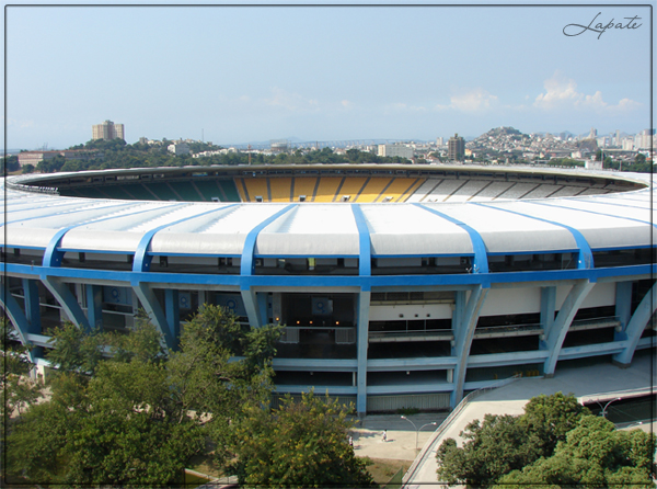 Maracanã - O Rio de Janeiro, ainda tem lindas paisagens.